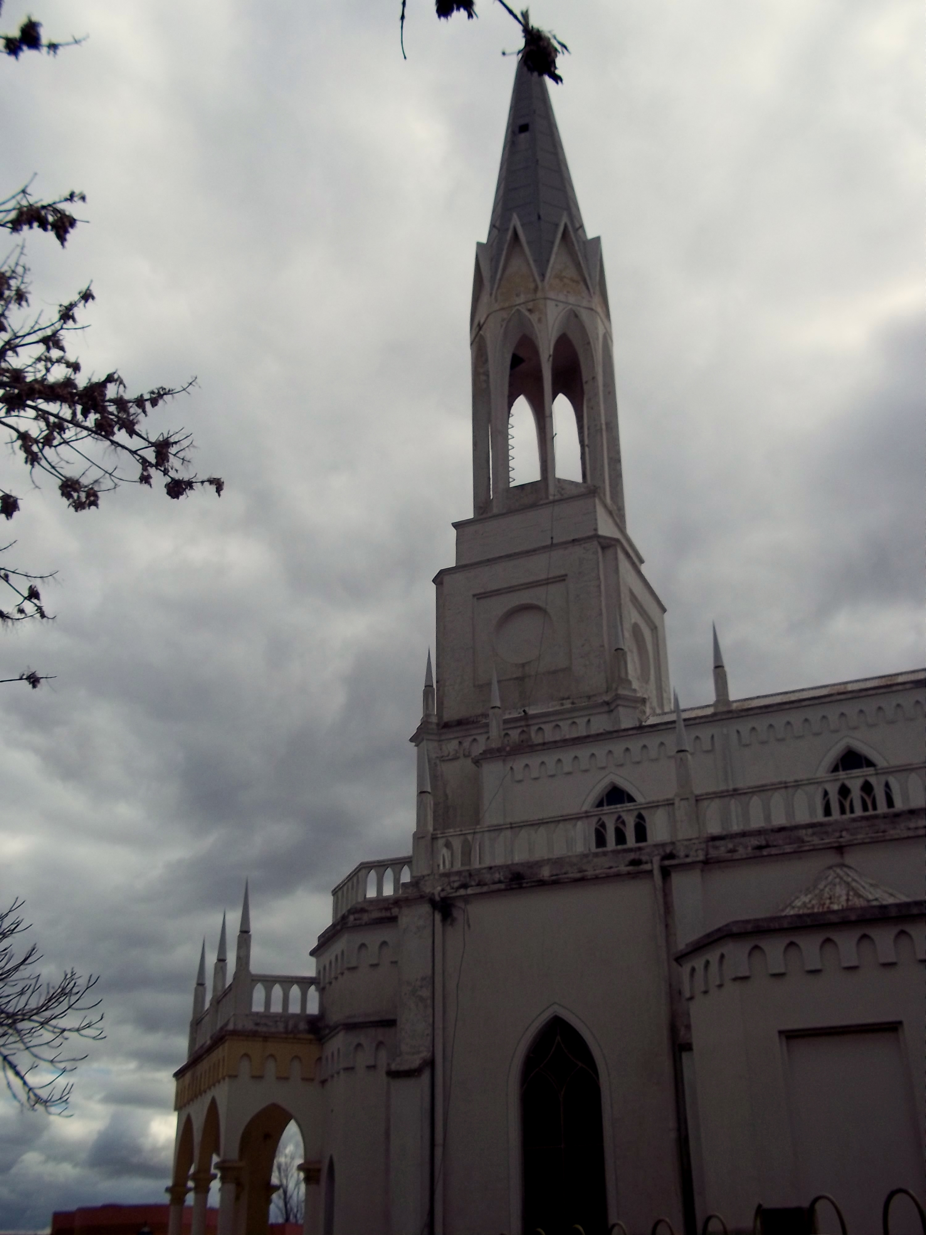 Parroquia "Virgen Niña" (Villa Elisa)